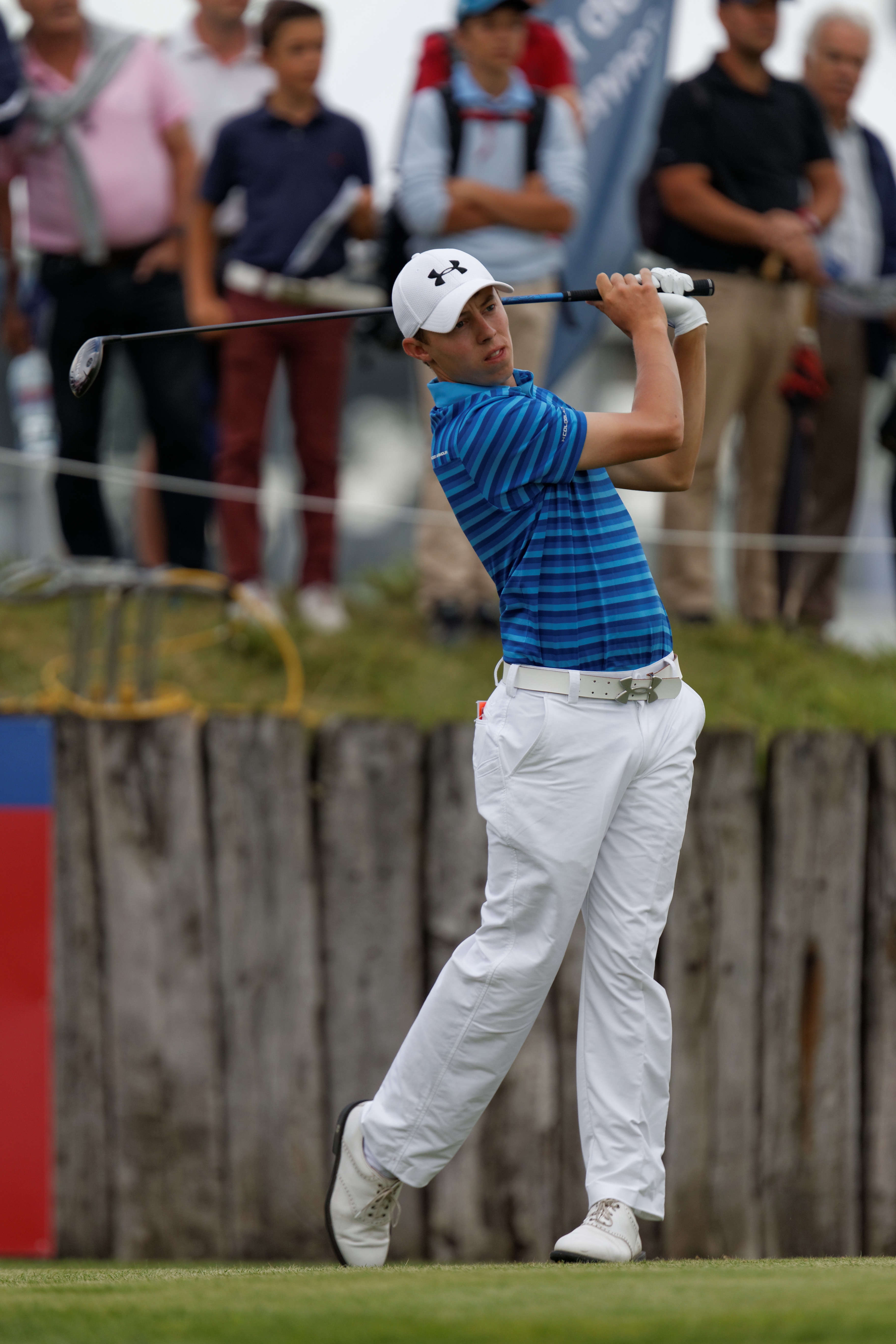 Matthew Fitzpatrick lors du second tour de l'Open de France 2014 - Golf National - Saint-Quentin-en-Yvelines (78) - départ du trou n° 10